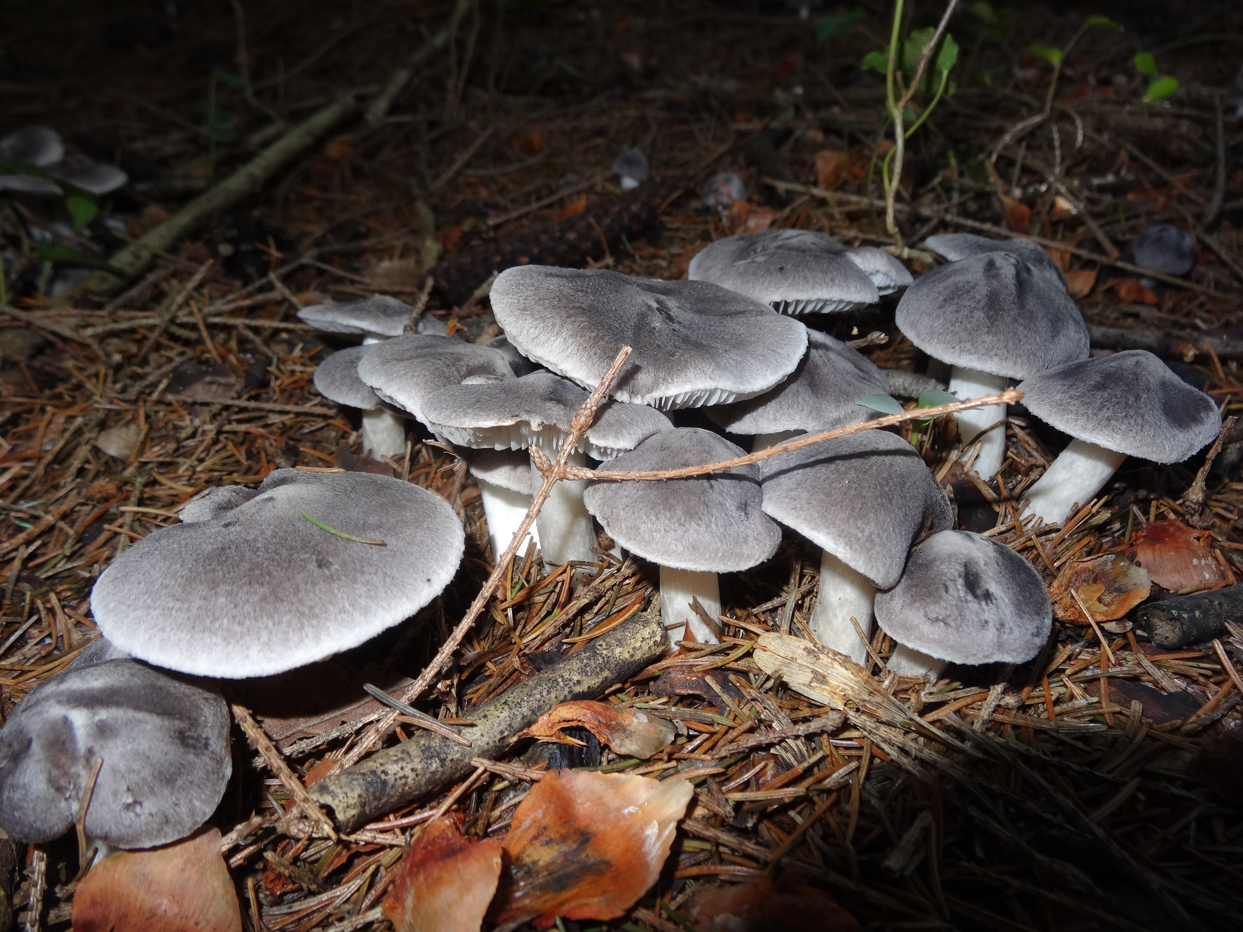 Tricholoma myomyces (jusqu'en 1933 Tricholoma terreum), ou tricholome couleur de souris, tricholome terreux, de ses noms vernaculaires charbonnier, petit gris ou griset